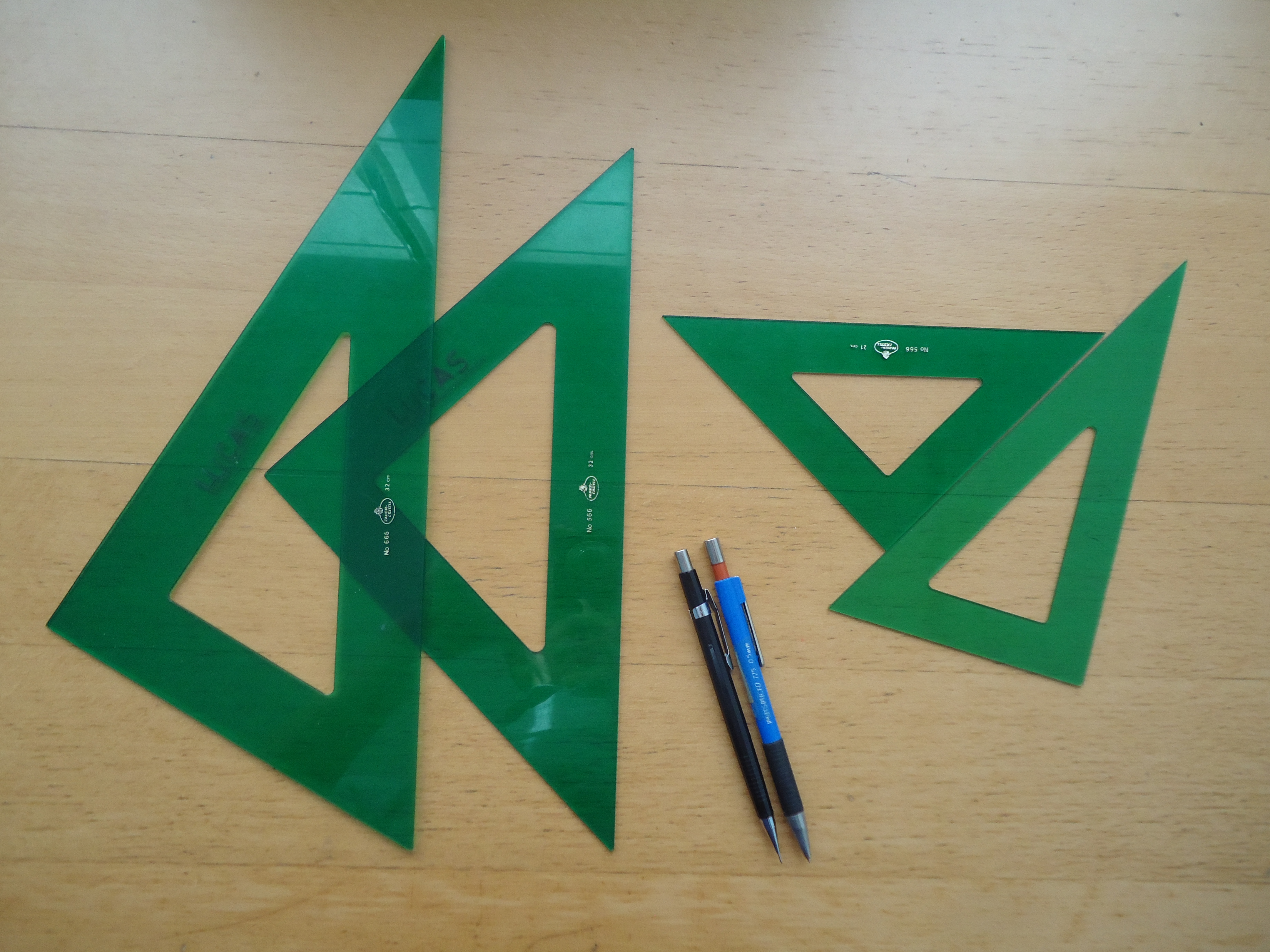 Escuadra y cartabón. Dos juegos de distintos tamaños